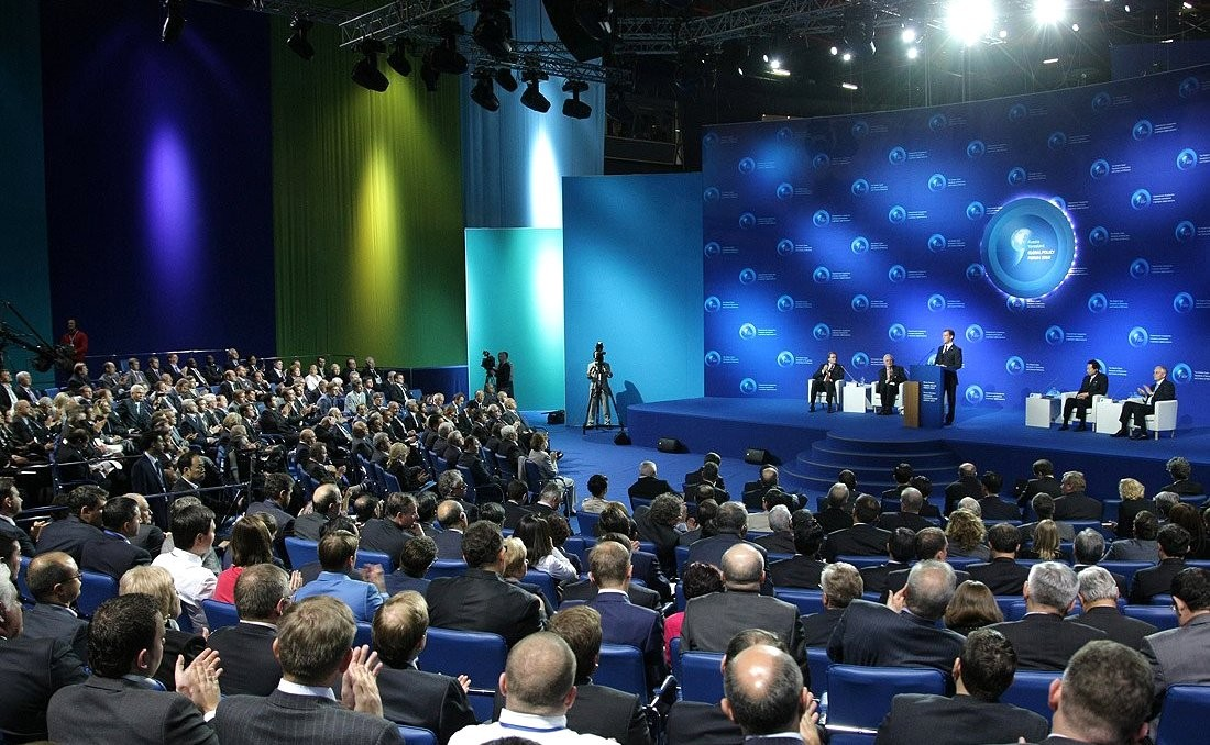 ЯРОСЛАВСКАЯ ОБЛАСТЬ, Ярославль. Пленарное заседание мирового политического форума «Современное государство: стандарты демократии и критерии эффективности».